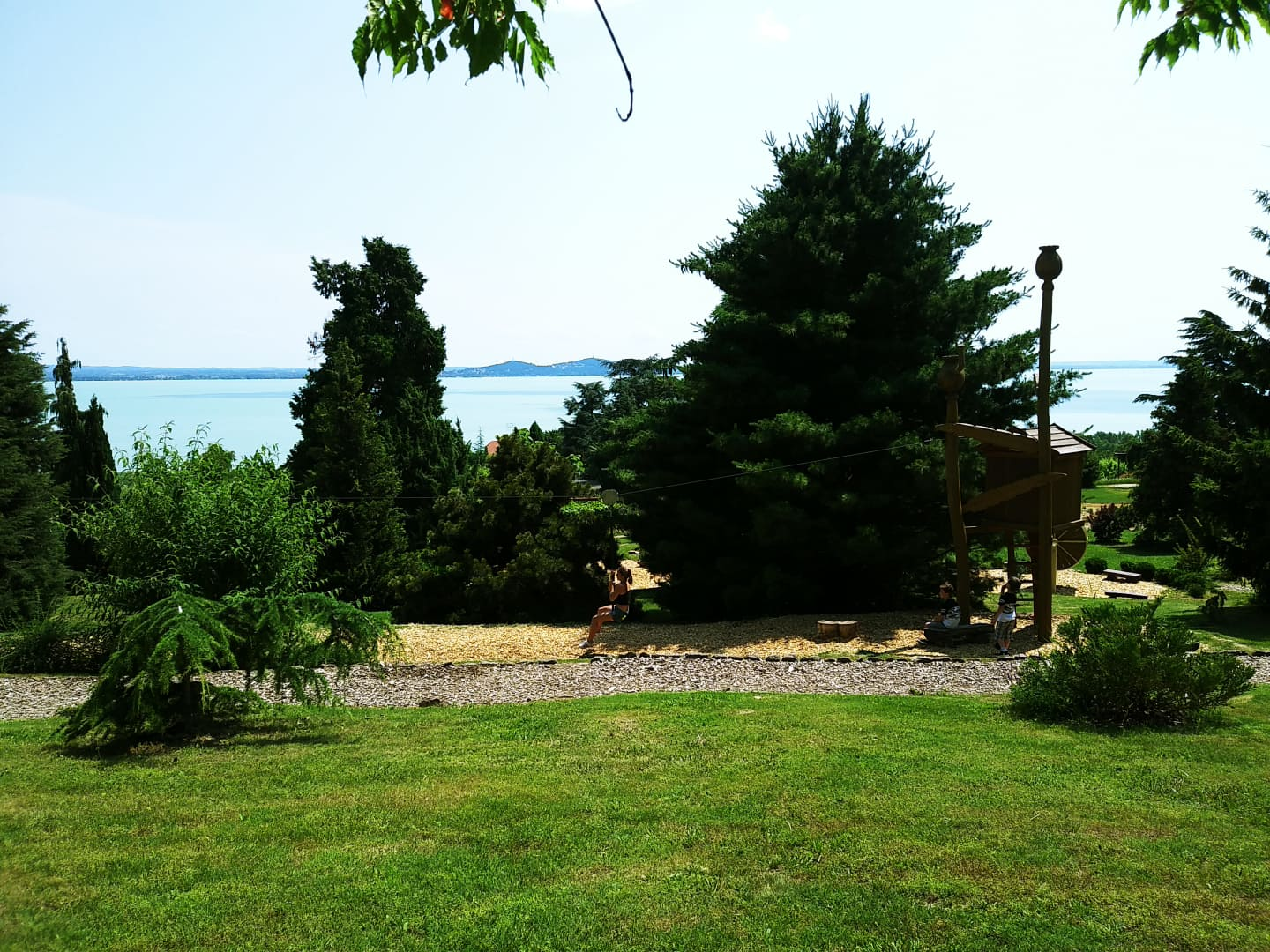 Folly arborétum